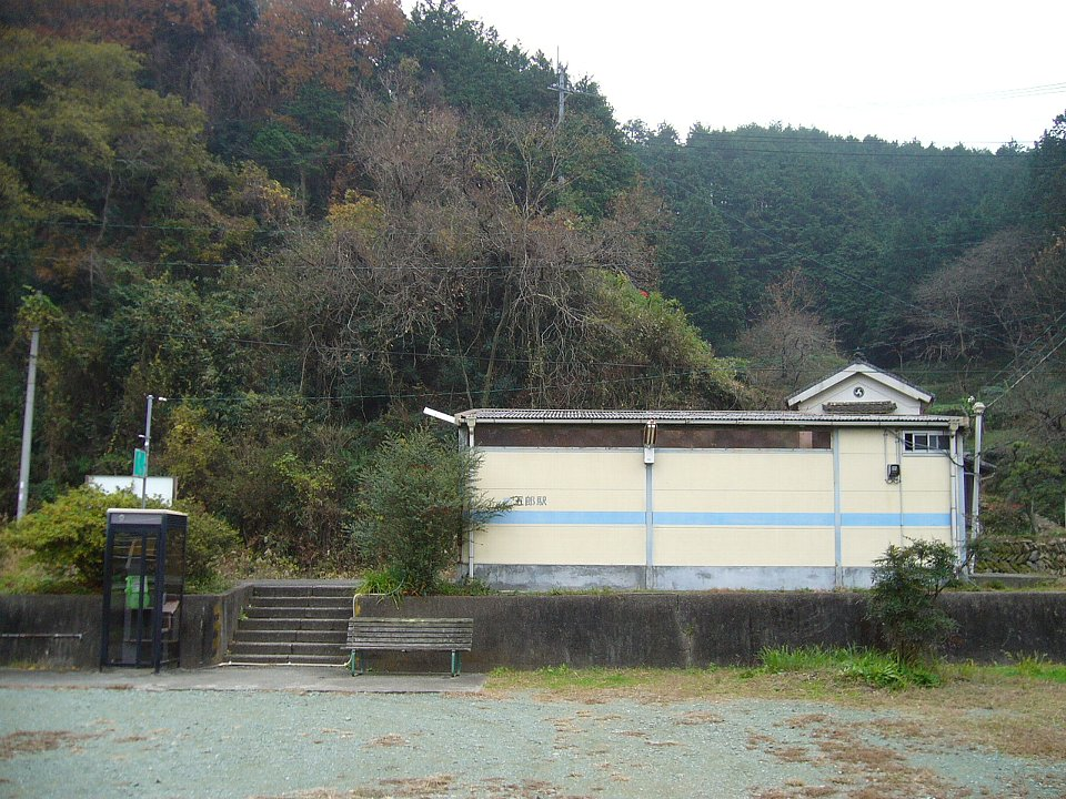 予讃線（旧線）五郎駅